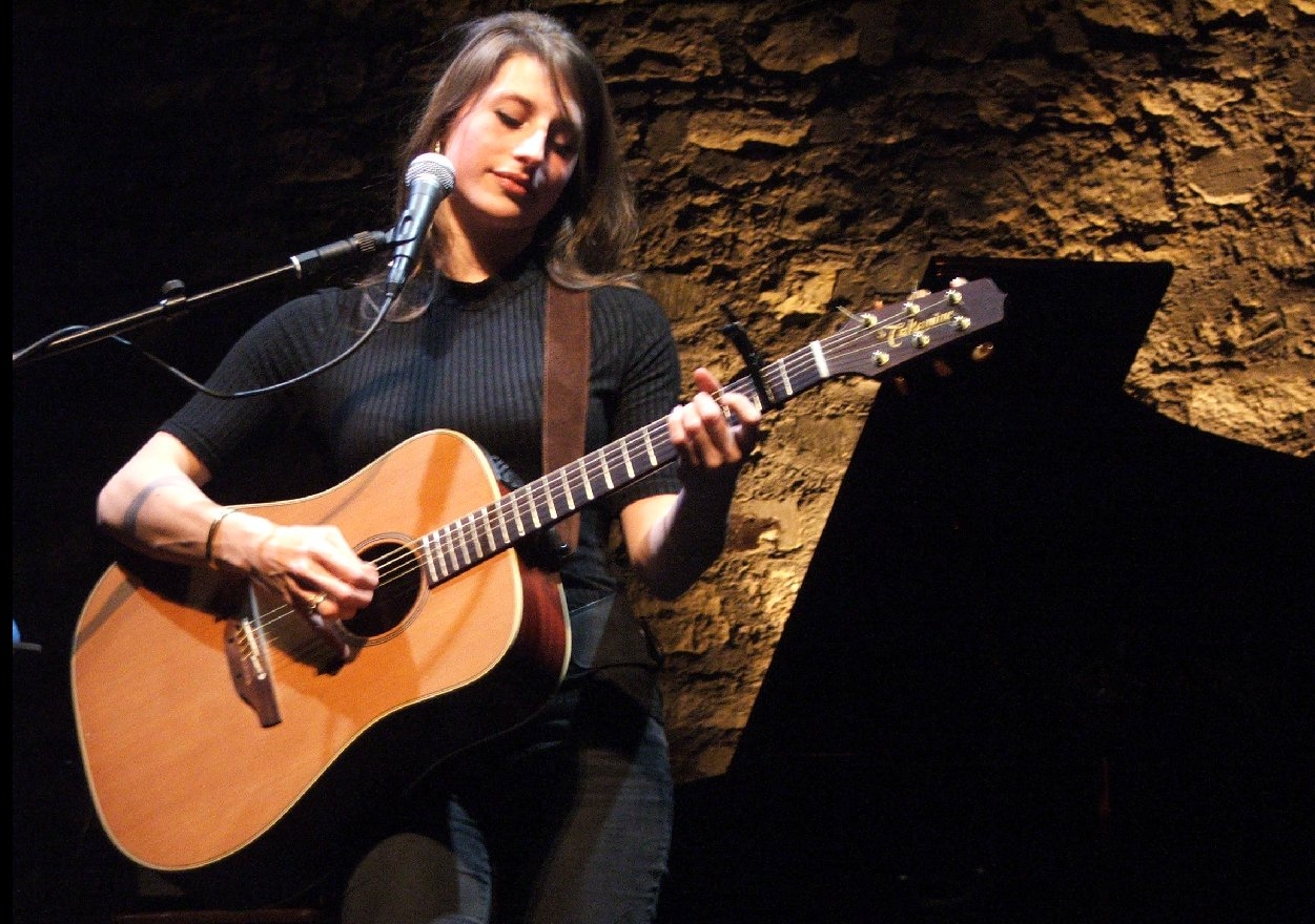 Marie Cherrier